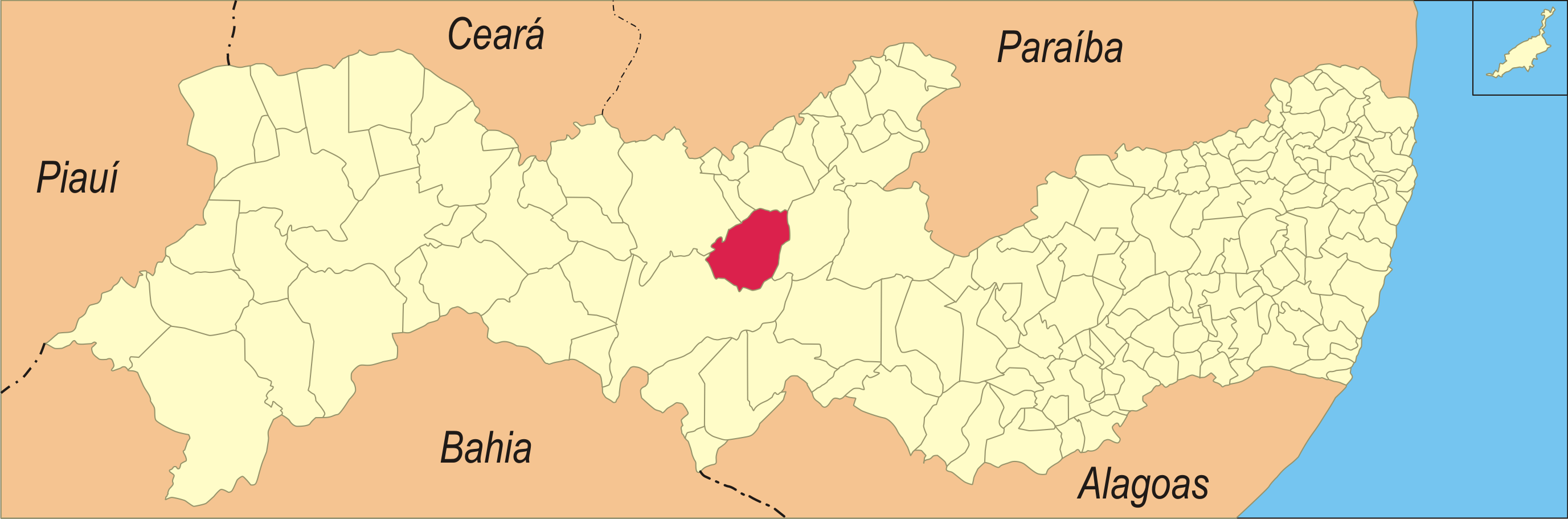 Localização da cidade em Pernambuco